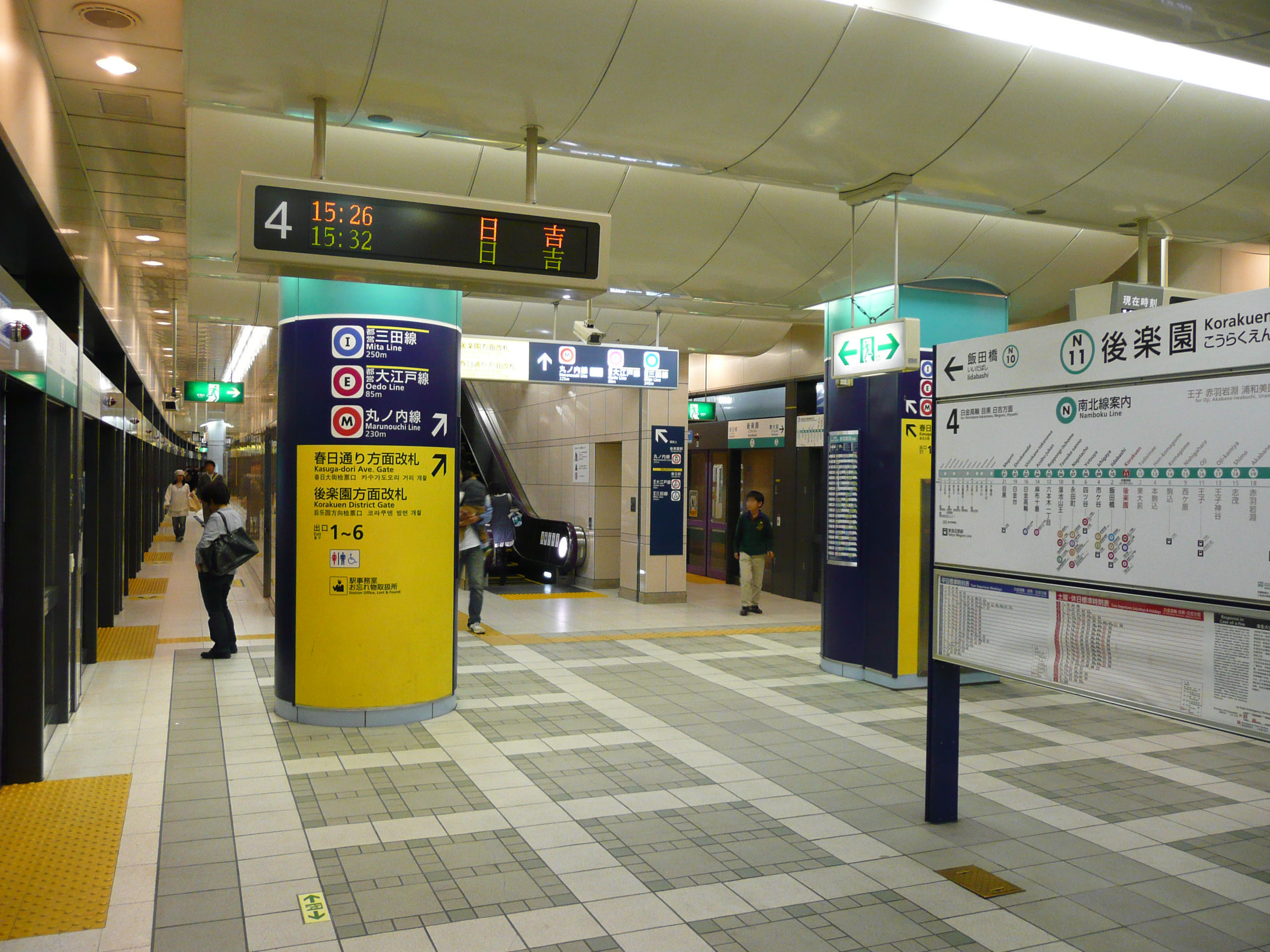 後楽園駅南北線ホーム